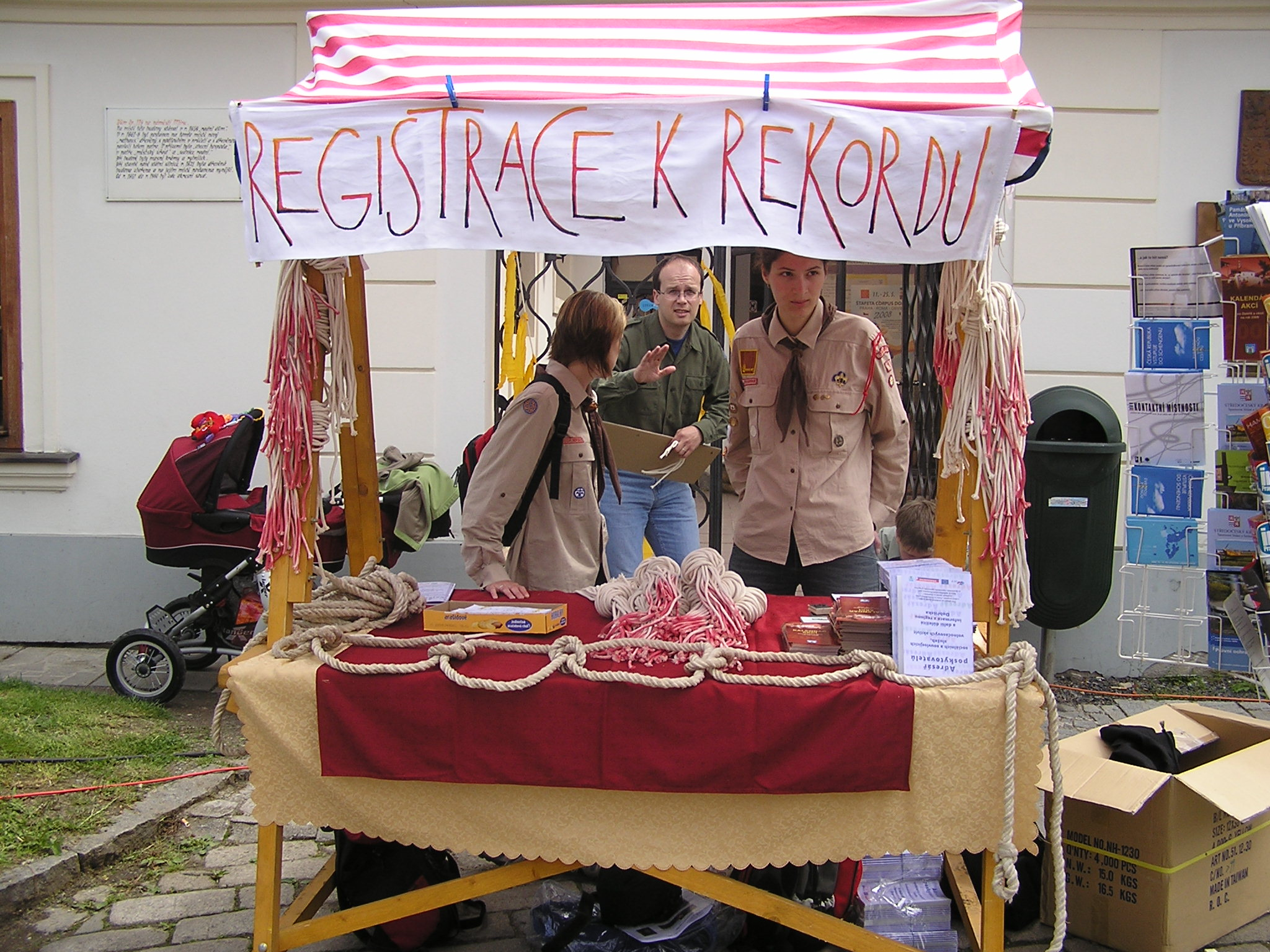 Registrace k rekordu o největší počet vázajících najednou ambulanční uzel. Dobříš, Mírové náměstí, před městským úřadem.